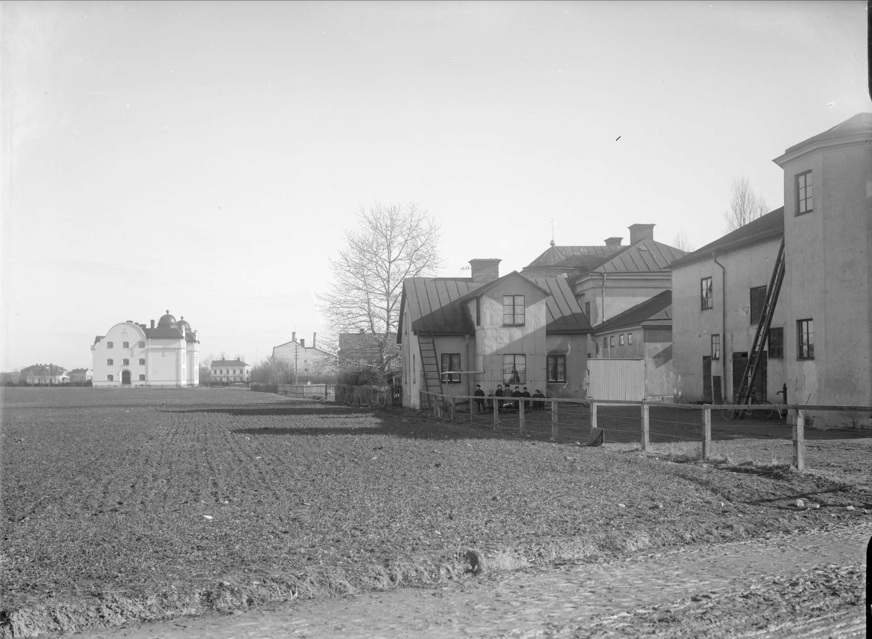 Sverkerskolan, fotad från väster 1908 av A. Dahlgren